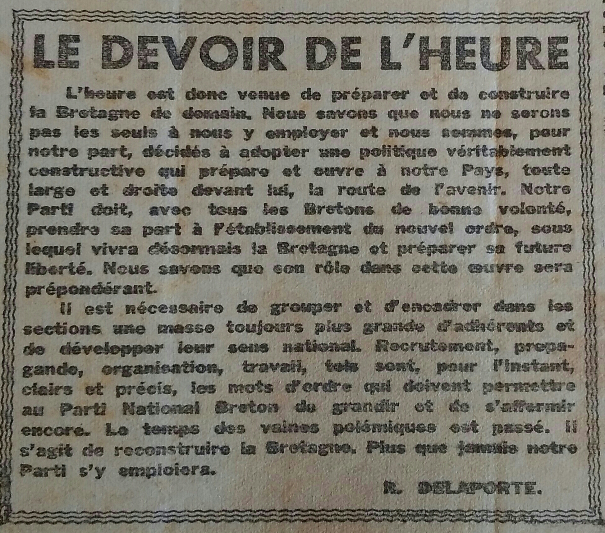 Testenn gant Raymond Delapore prezidant Strollad Broadel Breizh er gazetenn L'Heure bretonne, niverenn 177, d'an 12 a viz Kerzu 1943